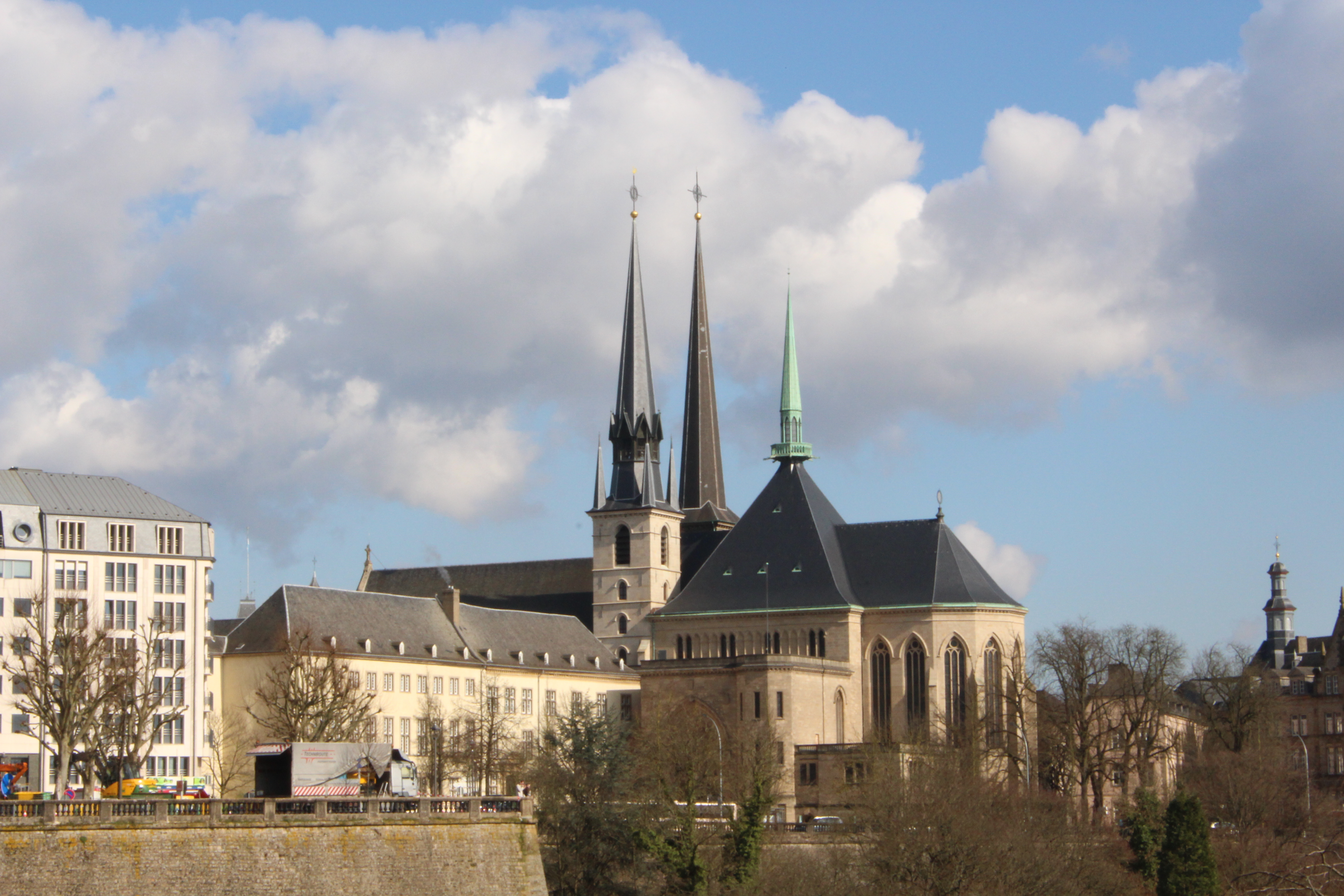 Kathedarale "Notre Dame" in Luxemburg-Stadt